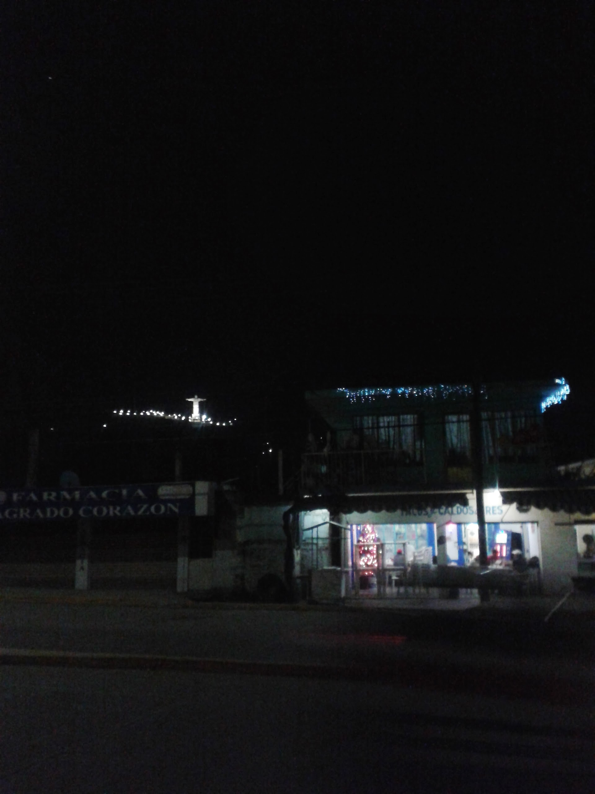 Toma nocturna del cristo redentor desde lejos.